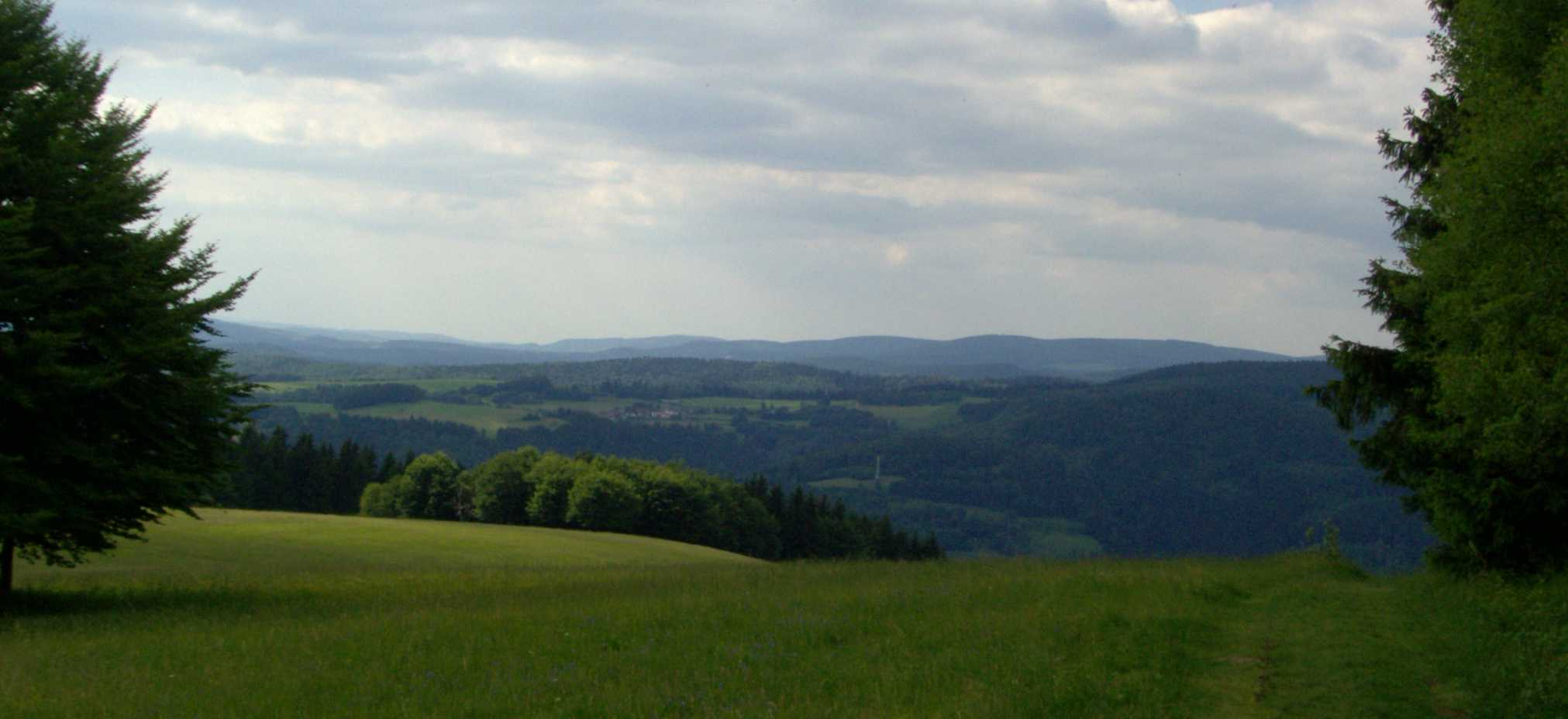 Blick vom Simmersberg (781 m) auf den Pleß (645 m, links der Mitte, 52 km entfernt) im Nordosten der Vorderen Rhön und den 14 km entfernten Adlersberg (849 m) mit Neuhäuser Hügel (891 m)